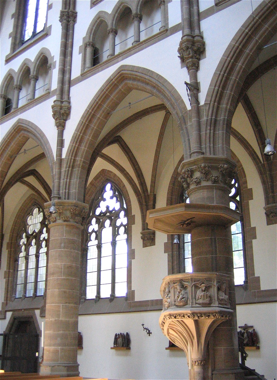 St._Paul in München, Innenraum